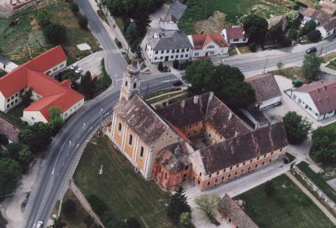 Preĝejo de Andocs.